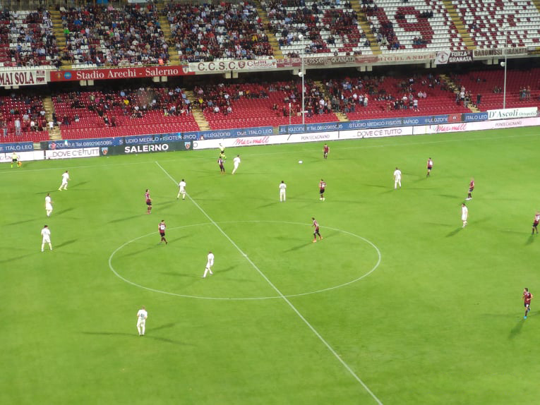 Attimi di gioco di Salernitana-Chievo 1-1 del campionato di Serie B 2019-2020. Foto scattata dall'utente Madip86.